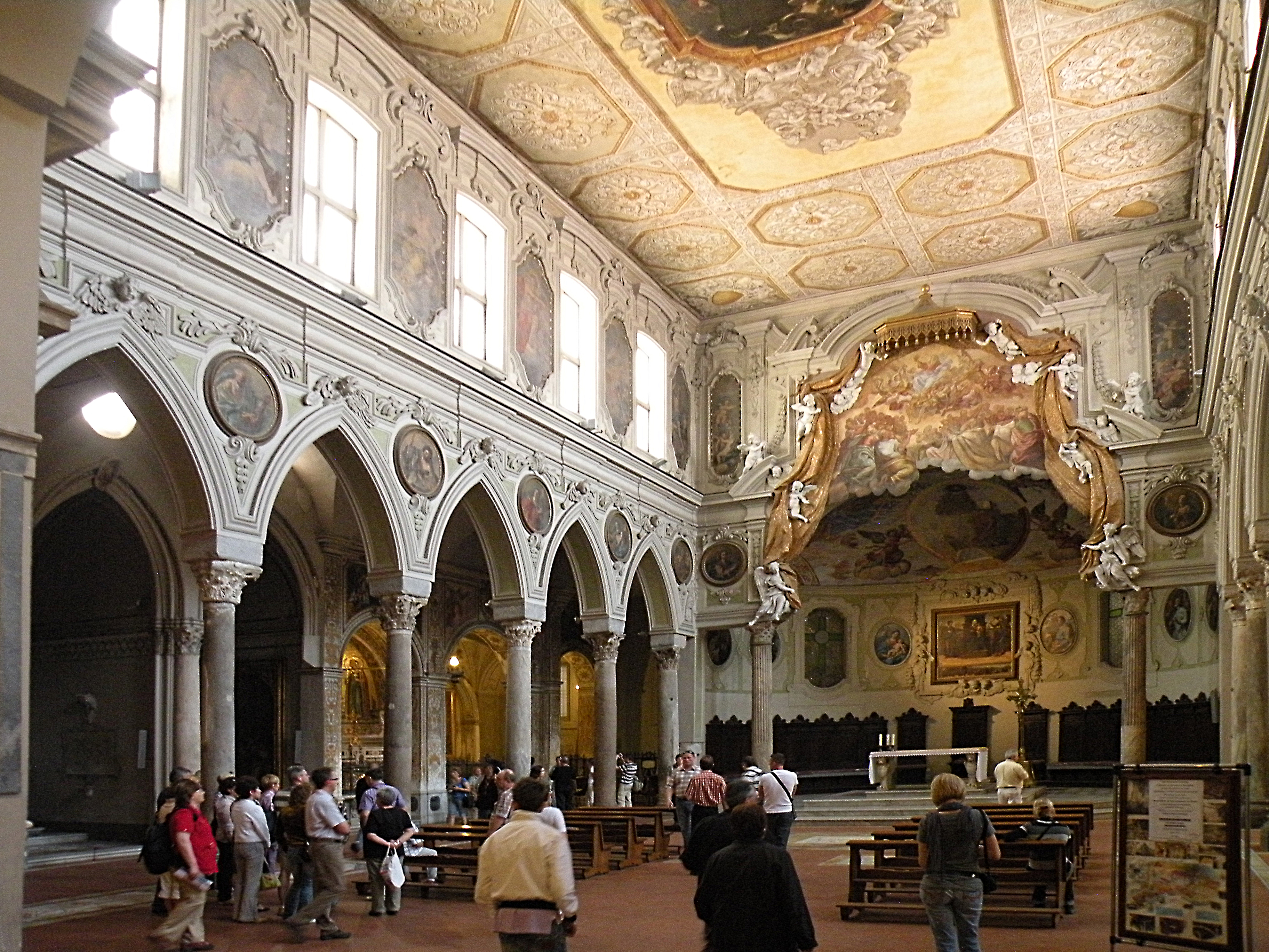 Капелла Св.Реституты